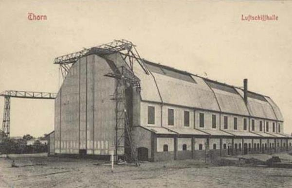 Hala sterowcowa w Toruniu